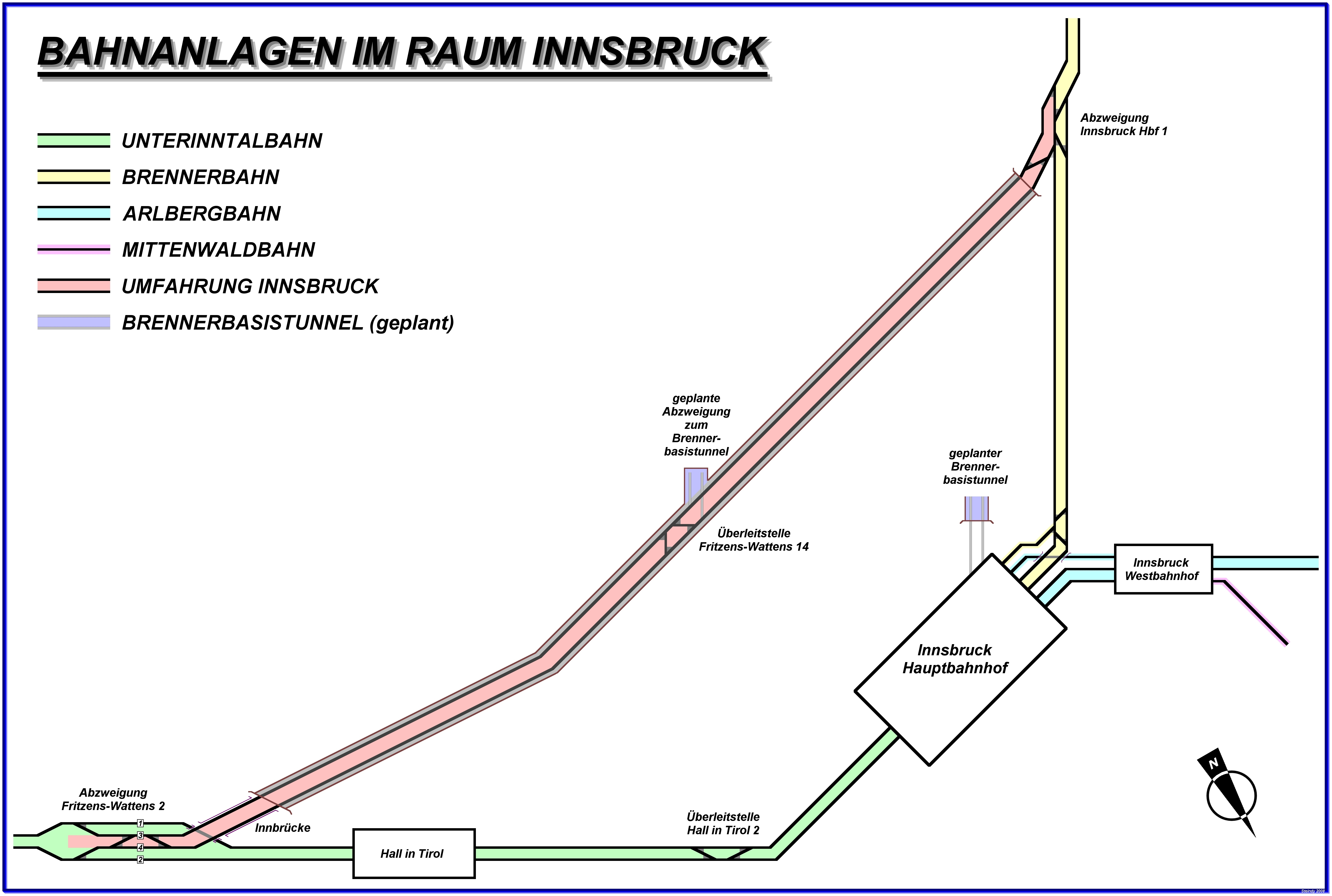 Bahnanlagen im Raum Innsbruck (Unterinntalbahn, Arlbergbahn, Brennerbahn, Umfahrung Innsbruck, Mittenwaldbahn, geplanter Brennerbasistunnel)